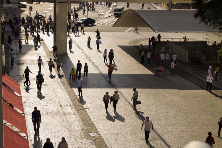 SAO PAULO, SP, BRASIL, 25-04-2012, 16h00: Calcadao na rua Direita esquina com praca do Patriarca, centro. Estudo do Mobilize Brasil, movimento em prol da mobilidade urbana, aponta condicoes das calcadas em 12 cidades do Brasil. (Foto: Ze Carlos Barretta/Folhapress FOTO) **EXCLUSIVO**